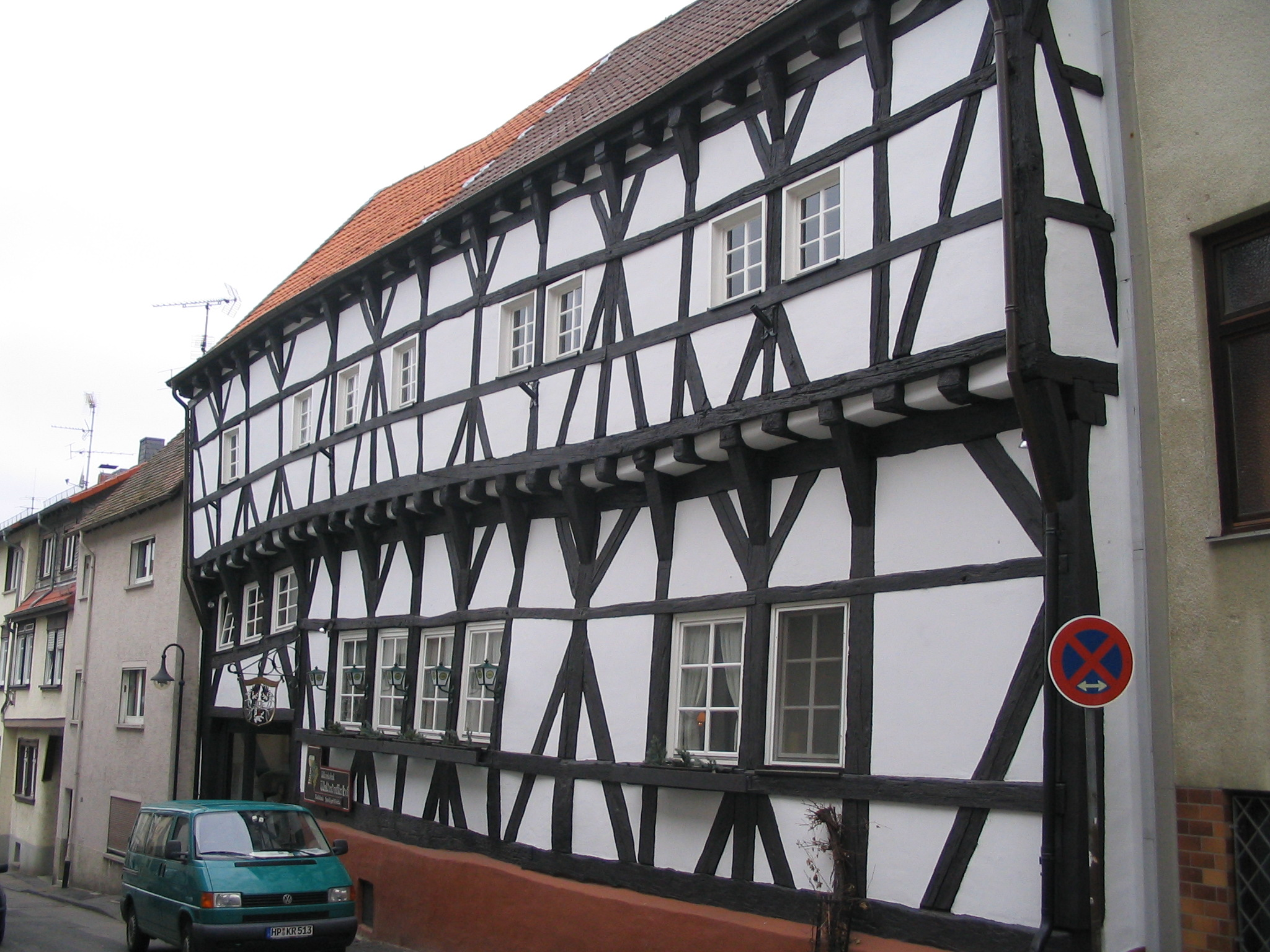 Walderdorffer Hof Bensheim, ältestes Fachwerkgebäude von Bensheim, Südfront